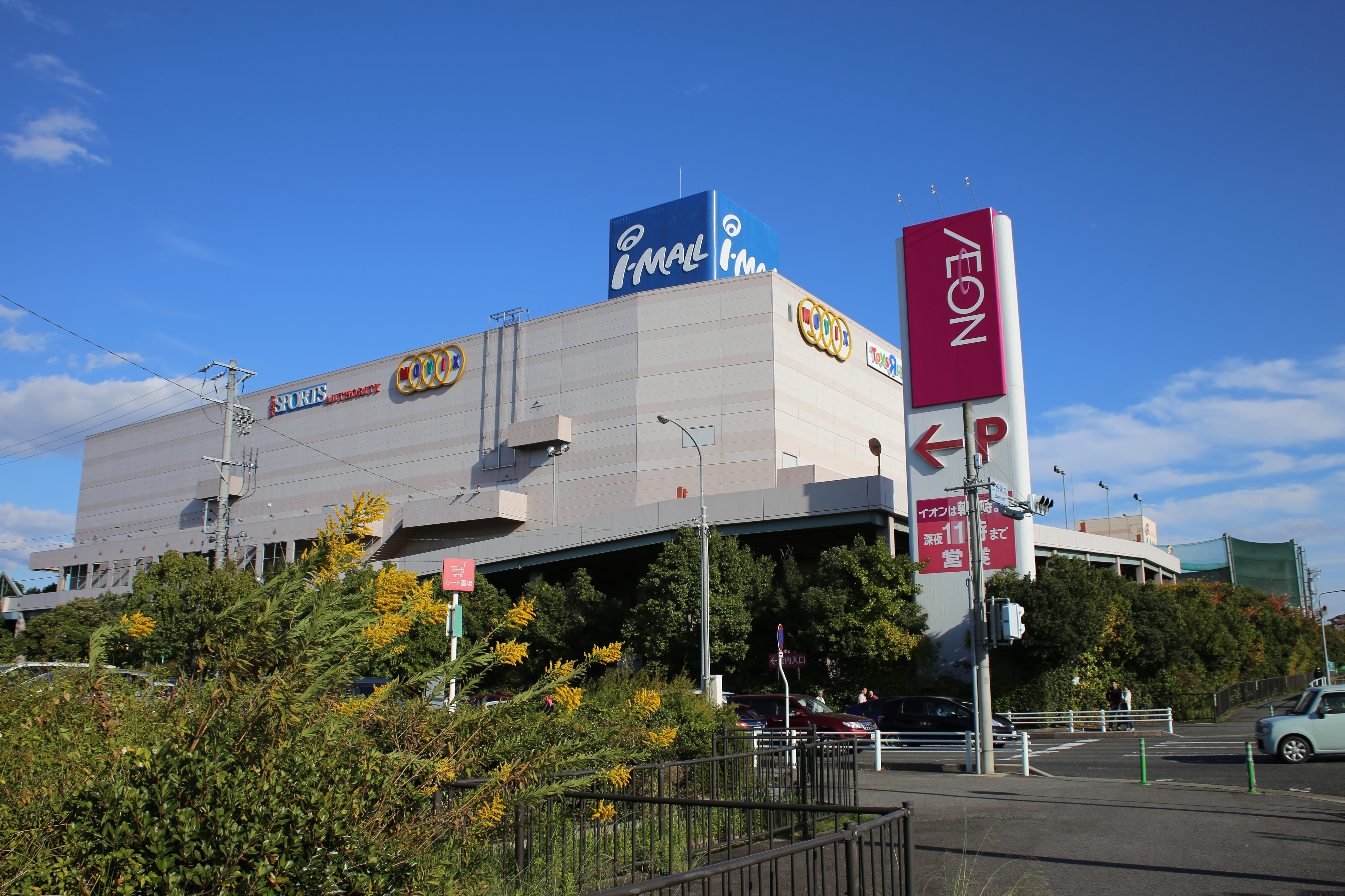 愛知県みよし市三好町青木のアイ・モール三好を南側公道西側より撮影